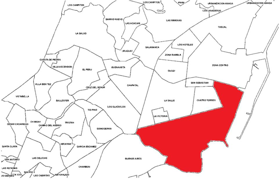 Extensión de la zona de Cabo-LLanos que comprende los barrios de El Cabo y Los LLanos